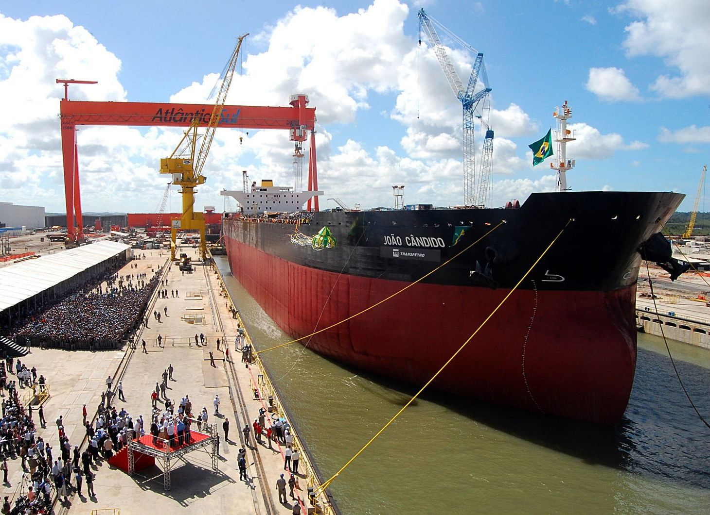 Estaleiro Atlântico Sul, situado no município de Ipojuca na Região Metropolitana do Recife, em Pernambuco, Brasil.